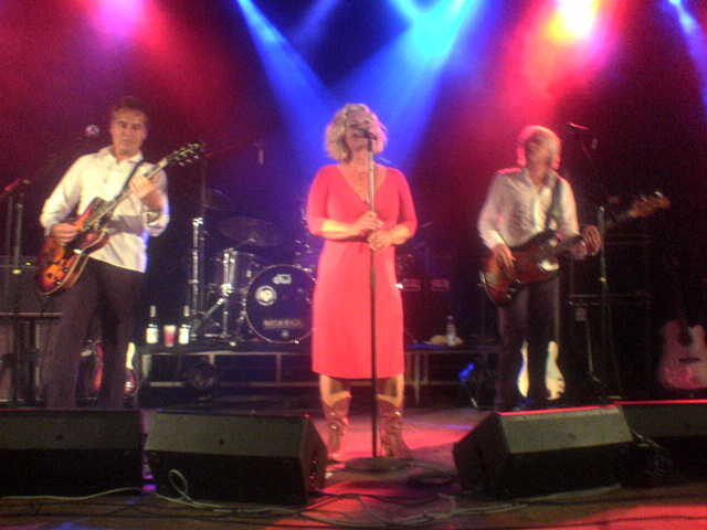 Rocazino live til McDonalds landsfest d. 26/8/06